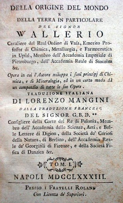 Frontespizio de Della origine del mondo...